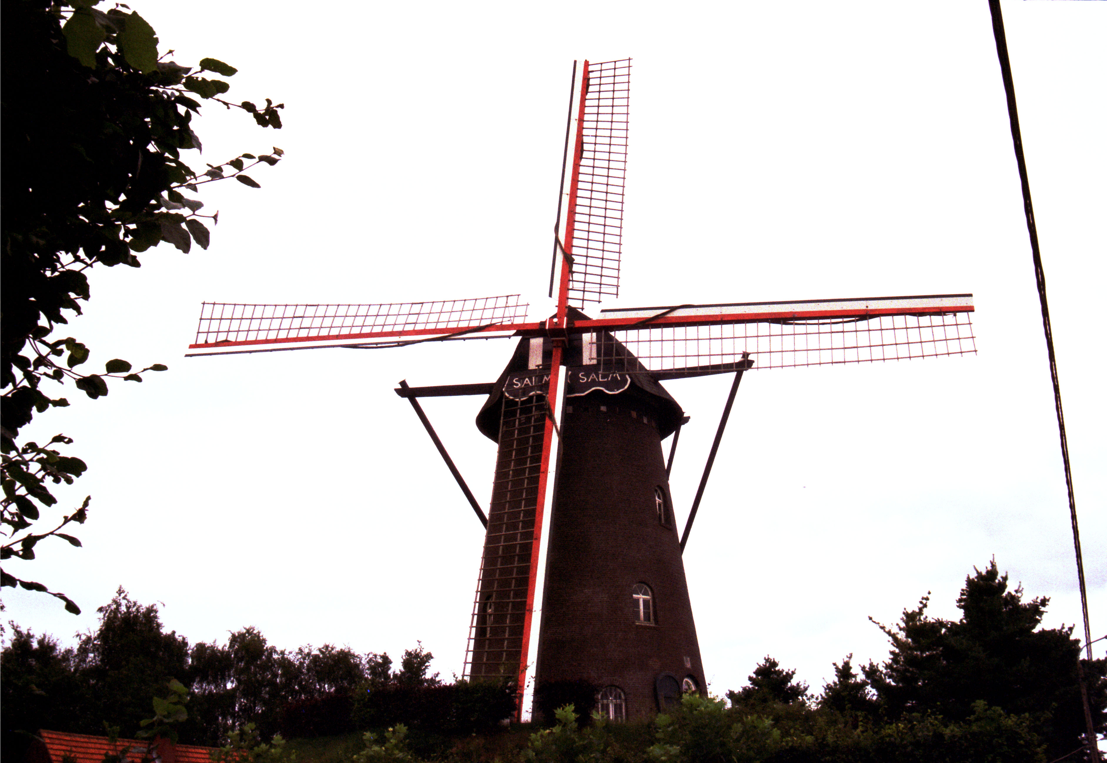 The windmill in Meerle, municipality Hoogstraten, Antwerpen province, Belgium, Europe